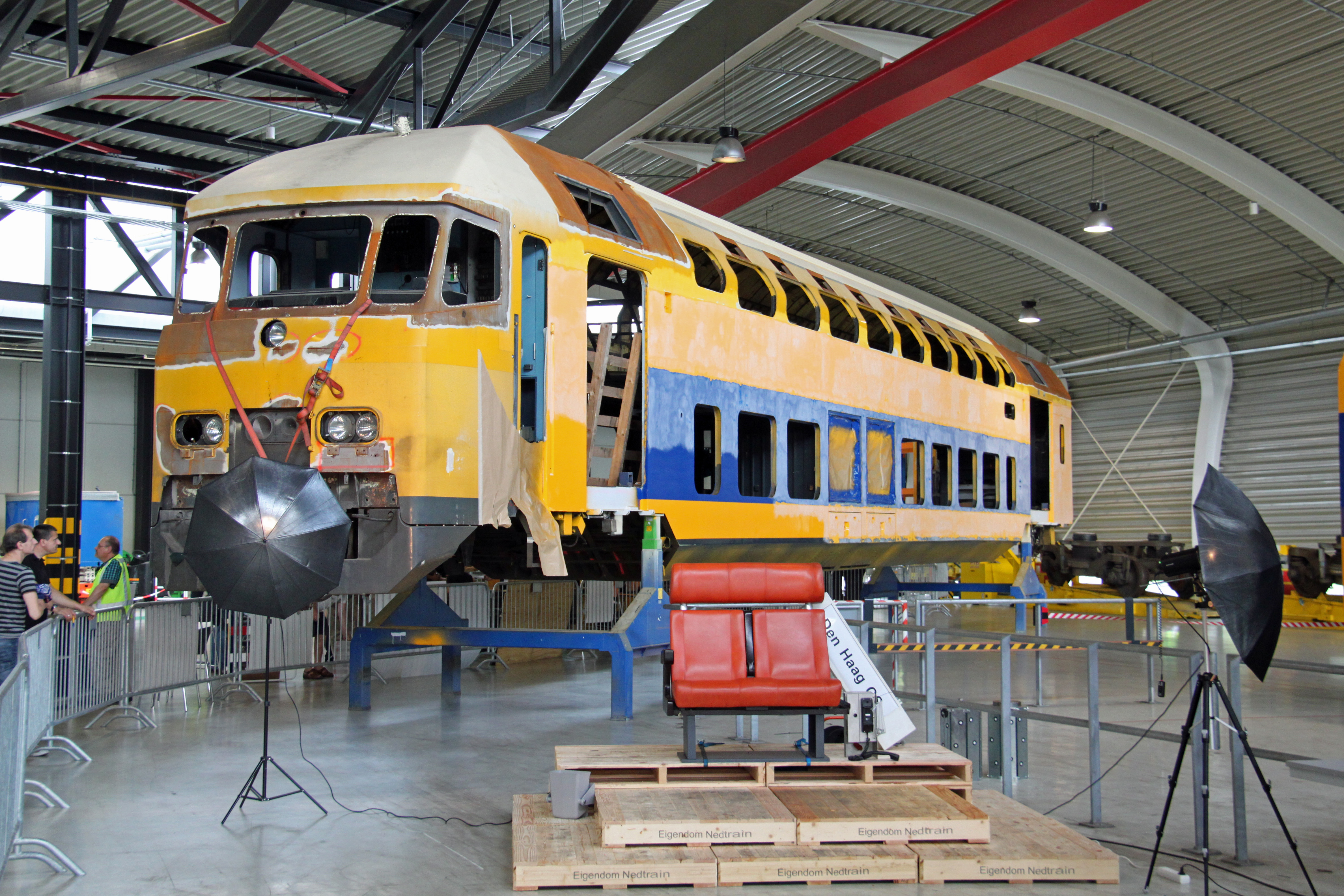 Een koprijtuig BvK wordt omgevormd van DDAR tot NID in de werkplaats van Nedtrain in Haarlem.